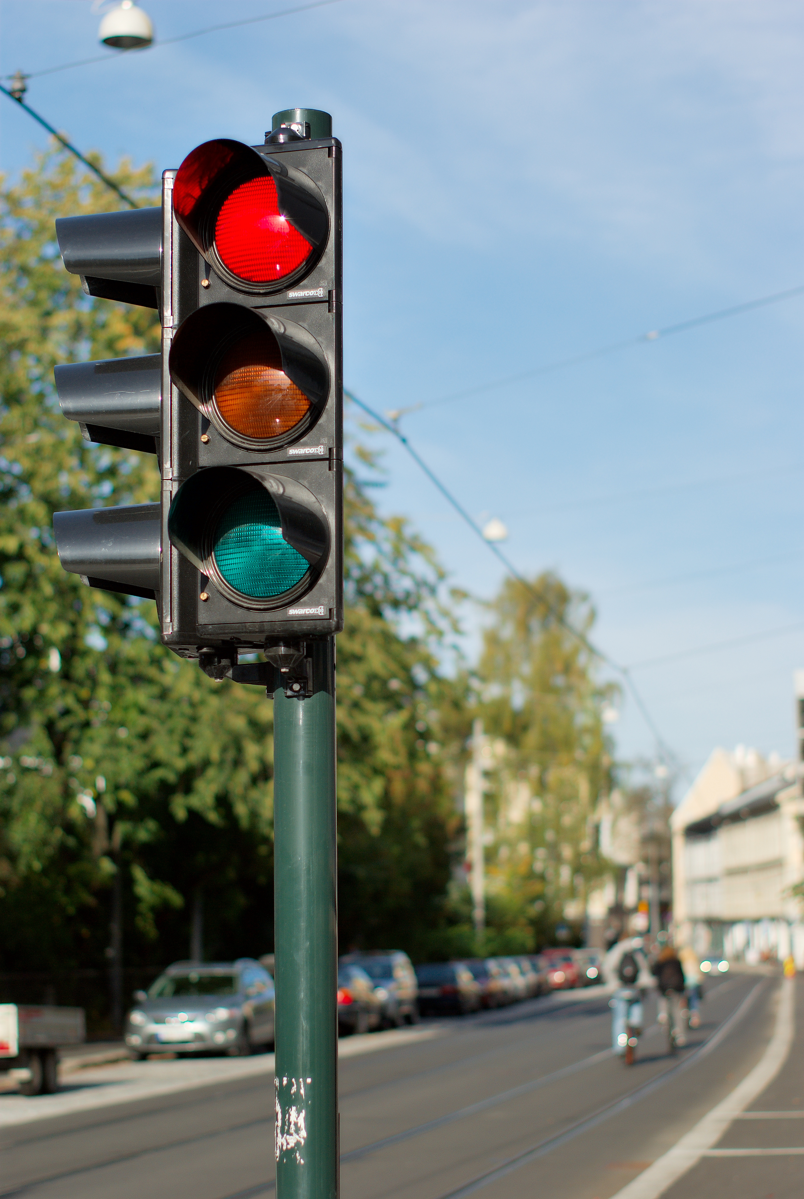 Stop sign in Holtegata in Oslo.